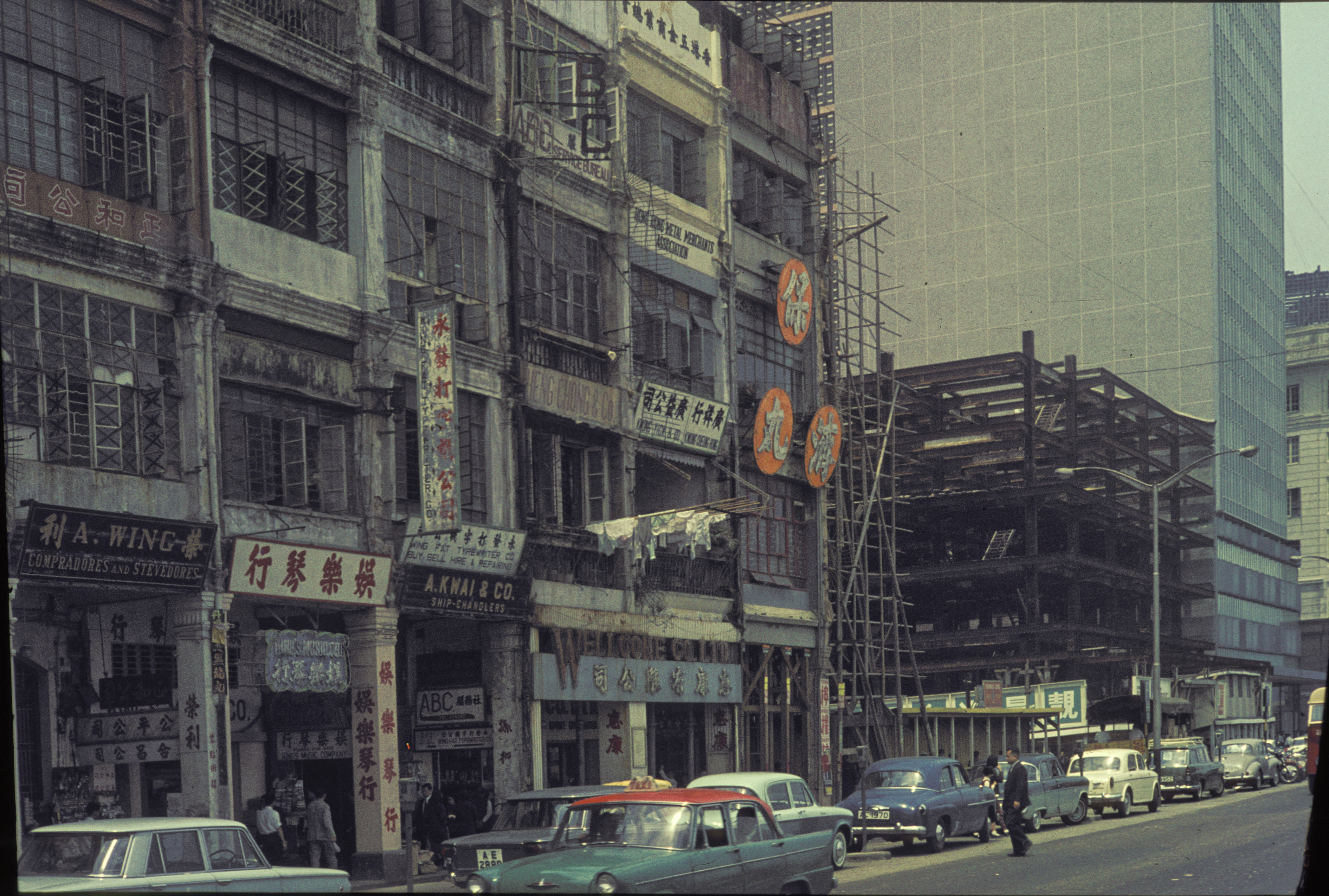 Hong Kong